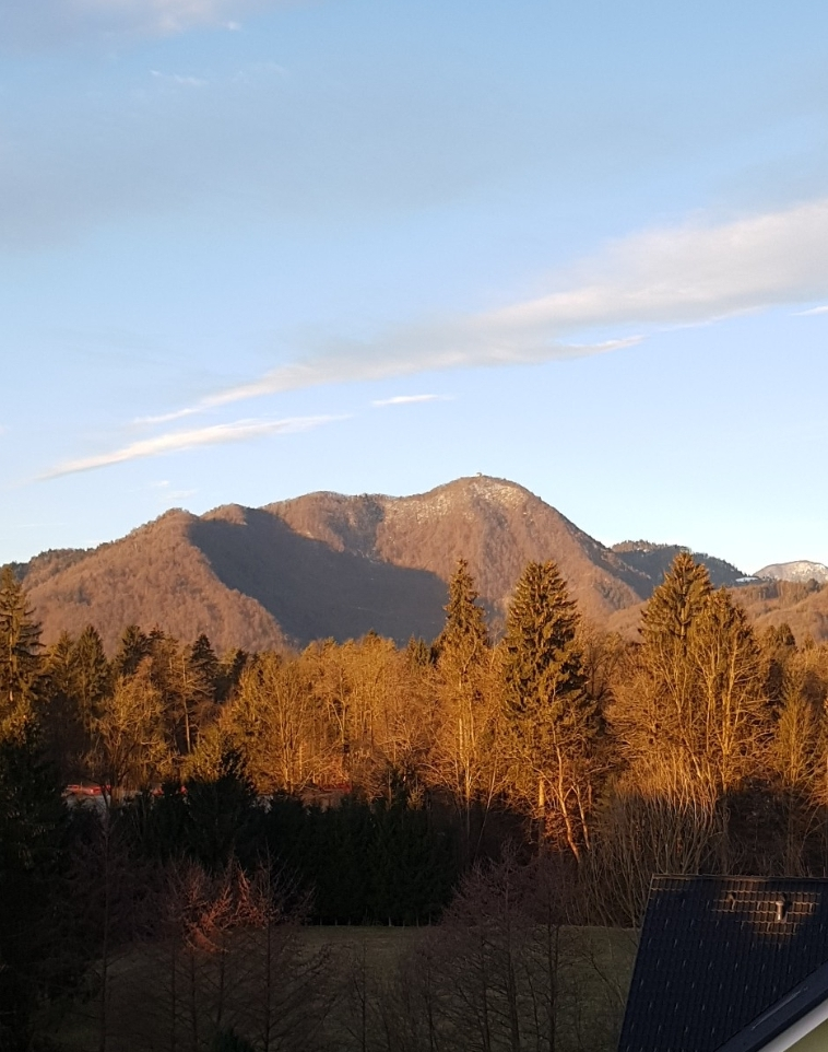 Lubnik ob sončnem vzhodu. Slikan s Sorškega polja.